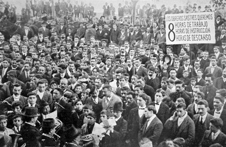 manifestaciónen Rosario por la 8 horas de trabajo